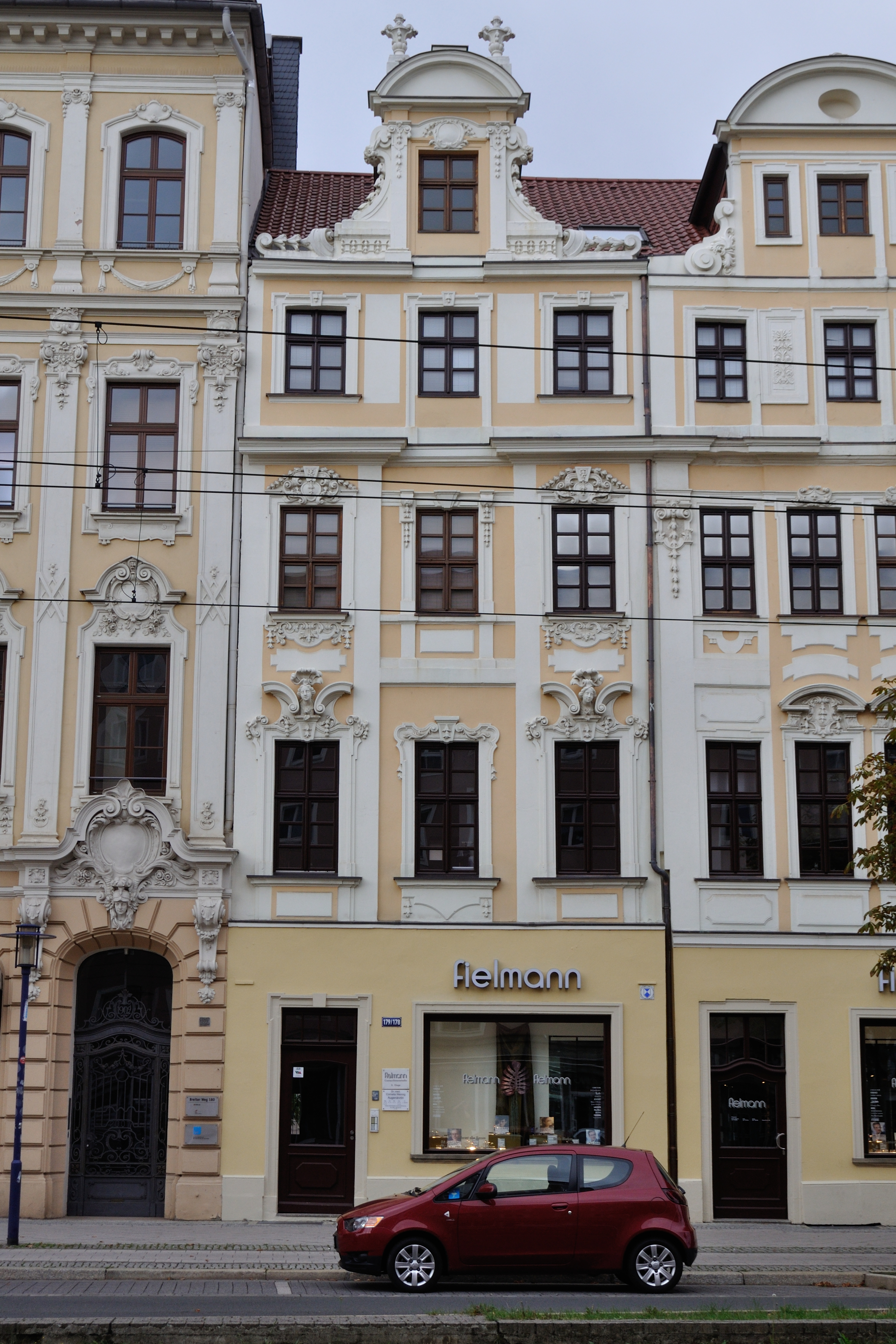 Wohnhaus Breiter Weg 179 in Magdeburg-Altstadt.